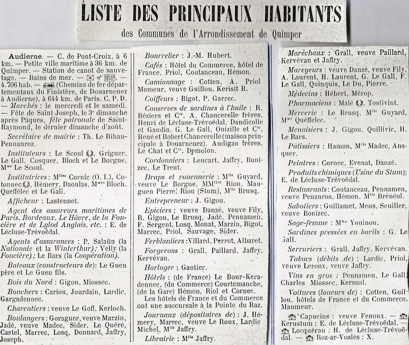 Liste des principaux habitants des communes de l'arrondissement de Quimper en 1911 : Audierne (Annuaire du Finistère, 1911)